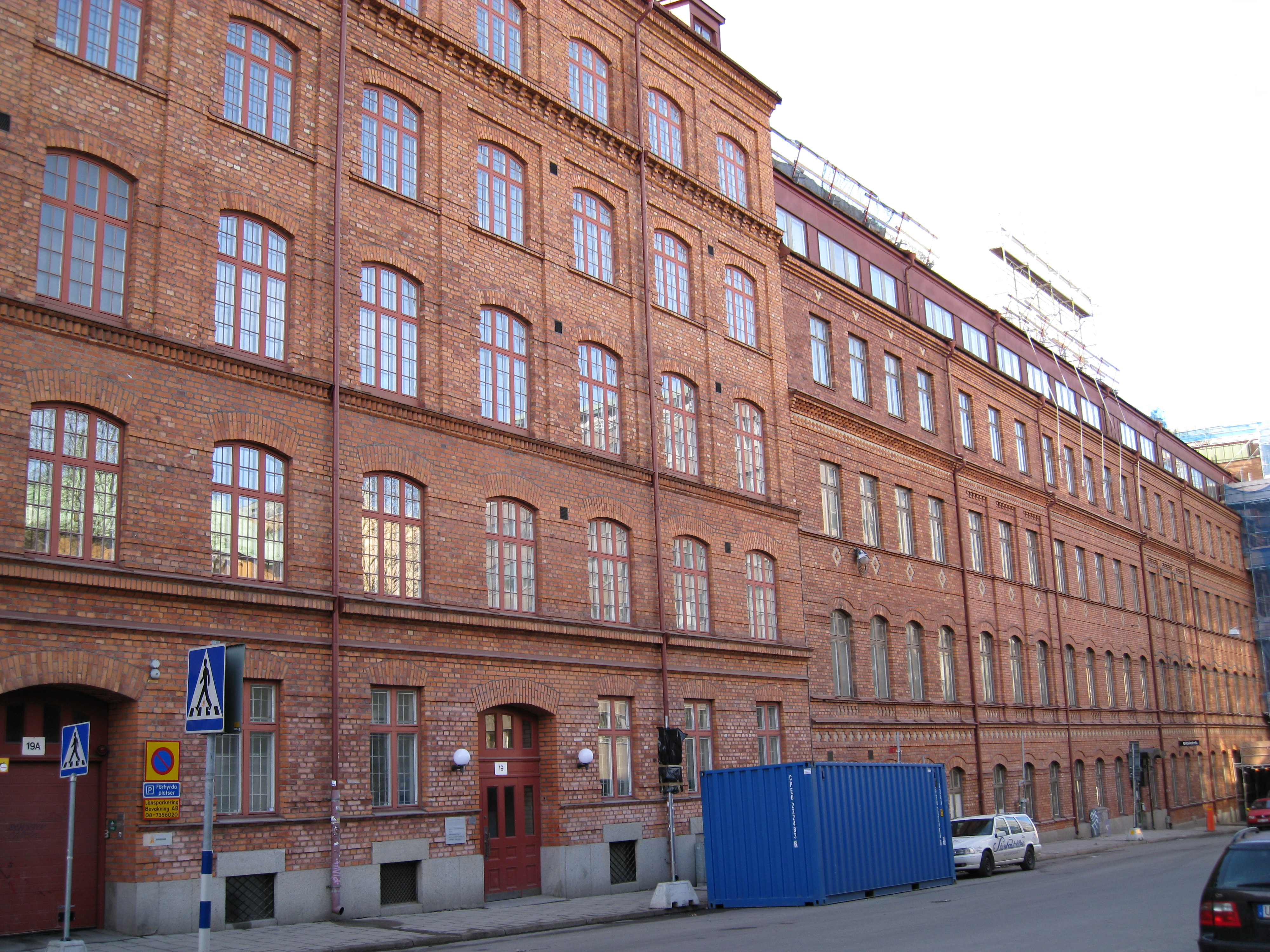 Stockholms Skofabrik på Hornsbruksgatan i Stockholm 2009